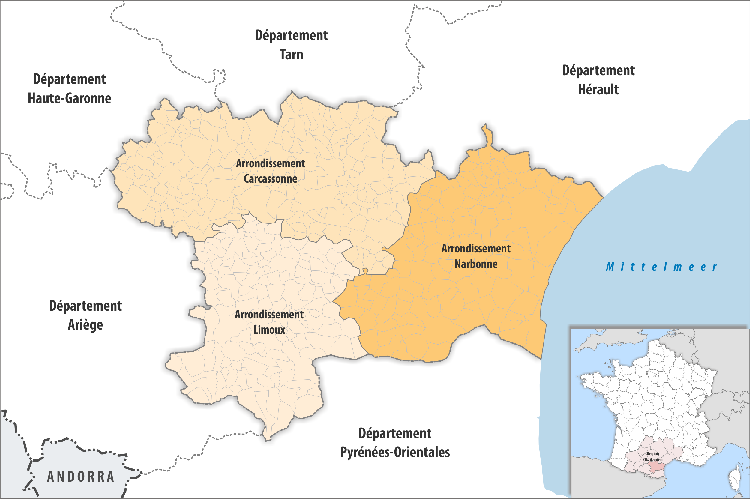 Gemeinden und Arrondissemente im Departement Aude